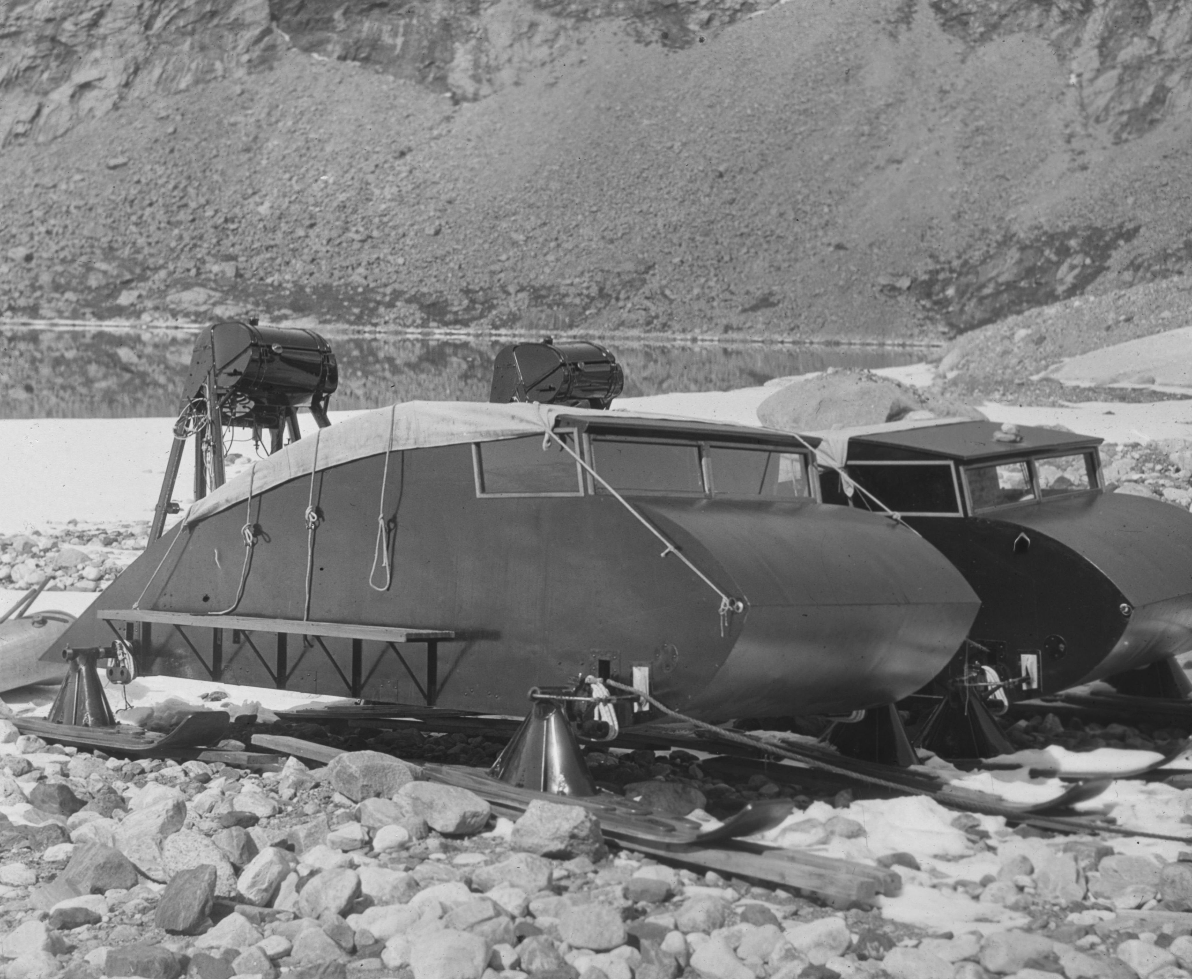 Photographs of the German expedition and overwintering in Greenland in 1930/31; Deutsche Grönlandexpedition Alfred Wegener; Motorschlitten "Eisbär" und "Schneespatz"; dieser Typ Propellerschlitten wurde ursprünglich in Finnland hergestellt von "Finnish State Aircraft Manufaetory" - zur Überquerung des Bottnischen Meerbusens; Maße: ca. 2 x 6 m; Kabine für 2 Piloten; Stahlrahmen mit Sperrholz; Motor: Siemens-Sh-12; 112 PS; Schlittengewicht ohne Motor: 250 kg; [1]